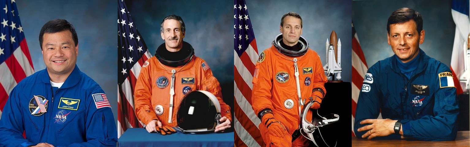 Assemblage des photos officielles de 4 astronautes qui en 2001 ont visité Mars (France)